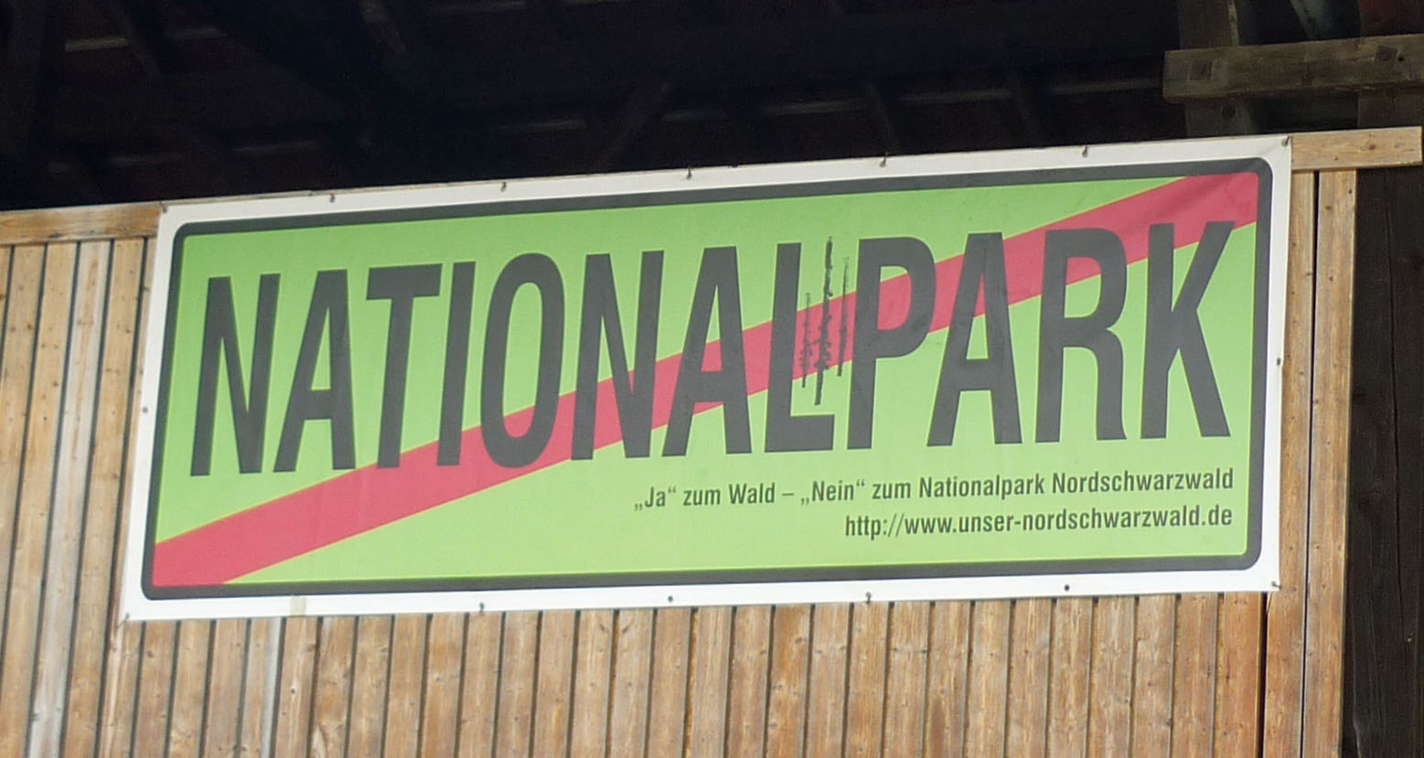 Gegner des Nationalparks Nordschwarzwald: "Ja zum Wald, Nein zum Nationalpark"